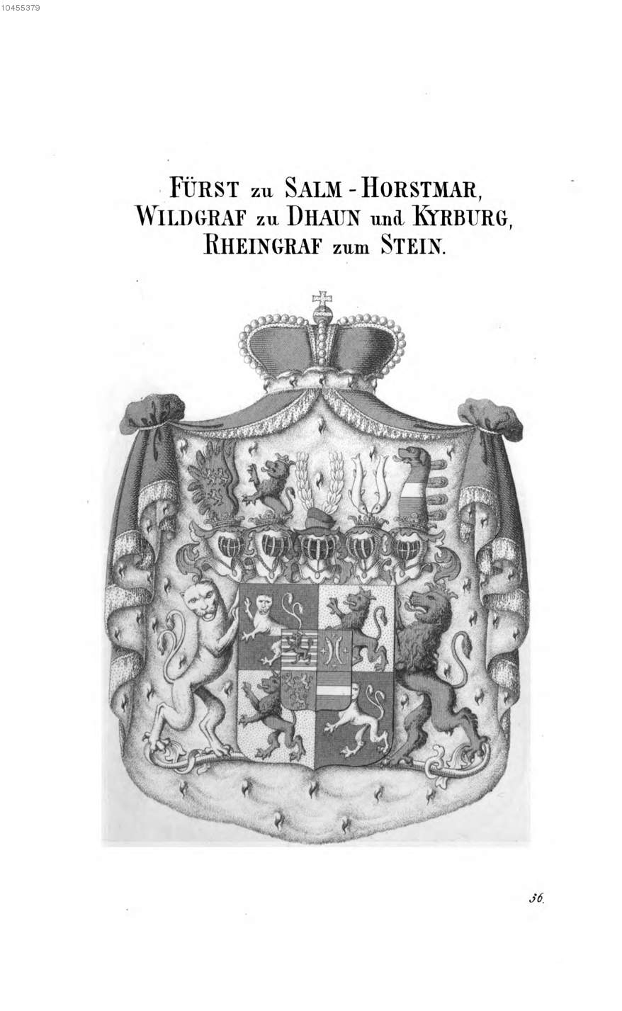 Berichtigung: Wappen Füst zu Salm-Horstmar, Wildgraf zu Dhaun und Kyrburg, Rheingraf zum Stein